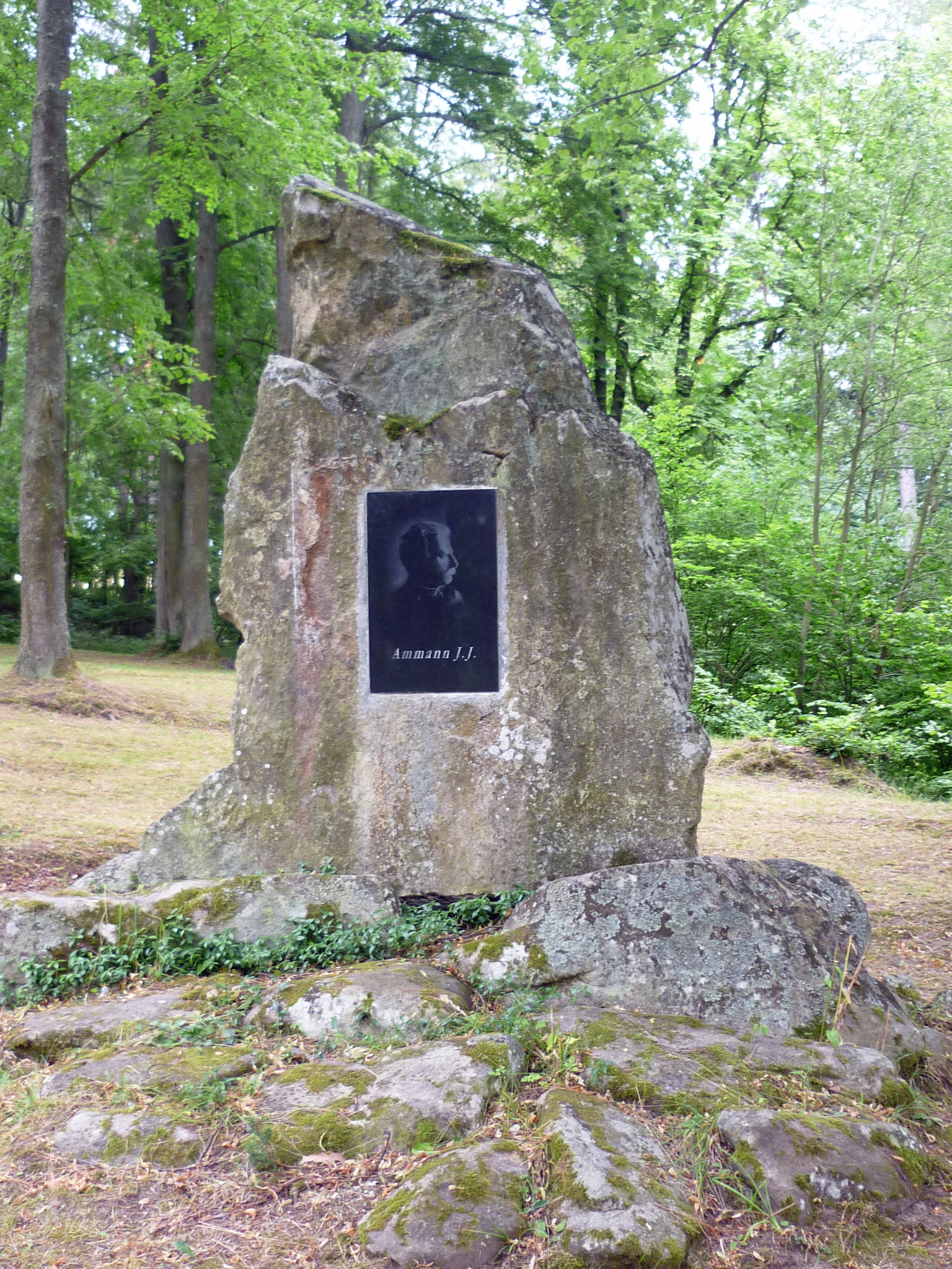 Ammann-Gedenkstein am Passionsspieltheater in Höritz (Hořice na Šumavě) im Böhmerwald